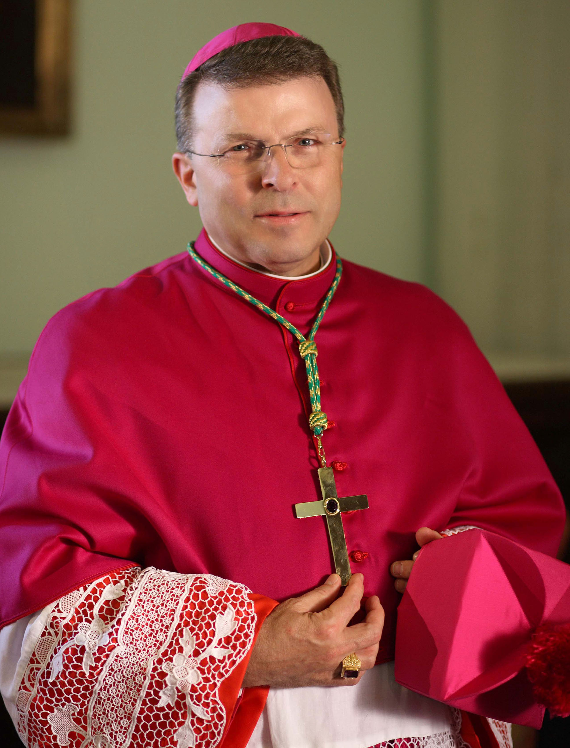 Armando Trasarti, bishop of Fano-Fossombrone-Cagli-Pergola.